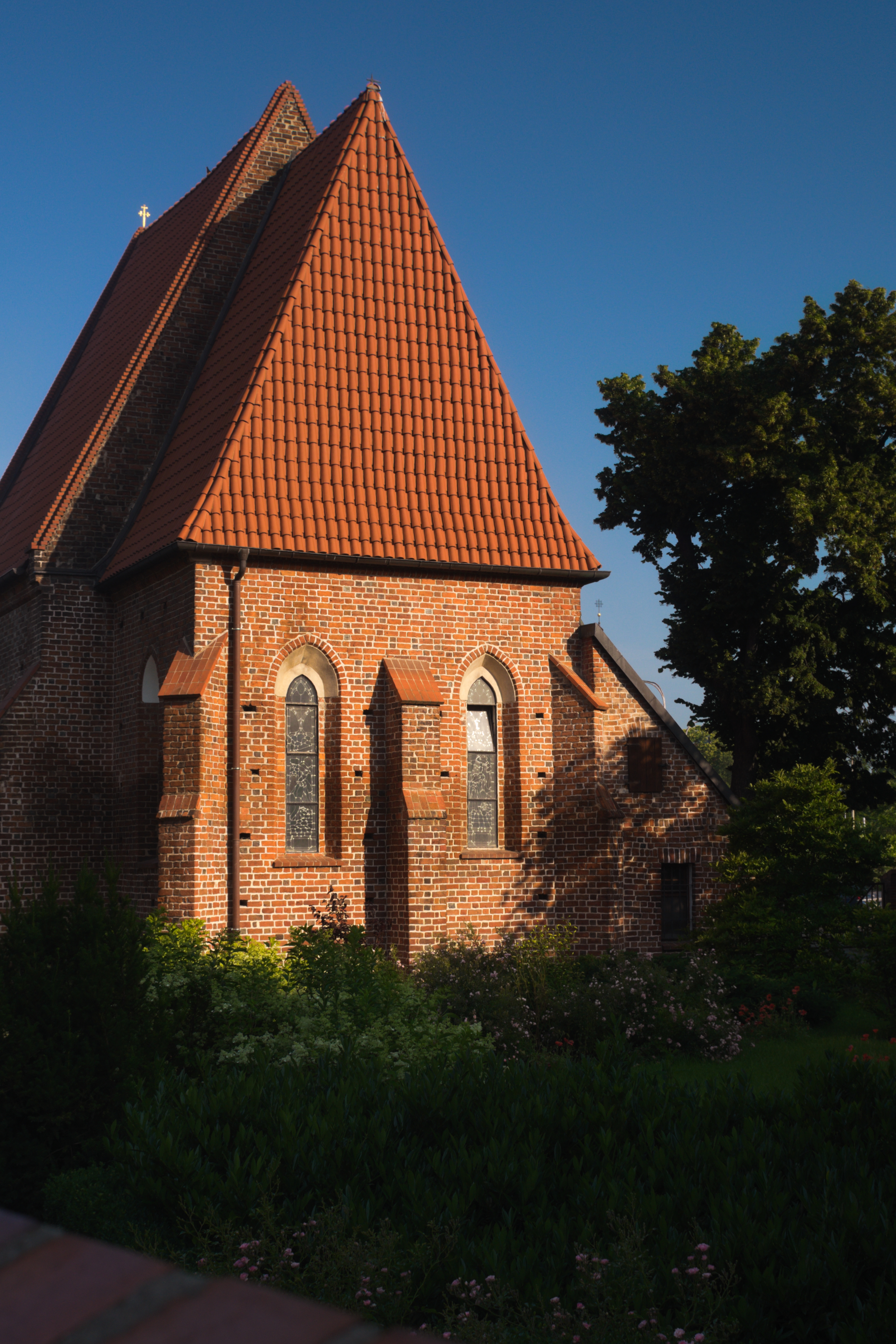 elewacja południowo-wschodnia kościoła św. Łazarza we Wrocławiu, widok zza ogrodzenia